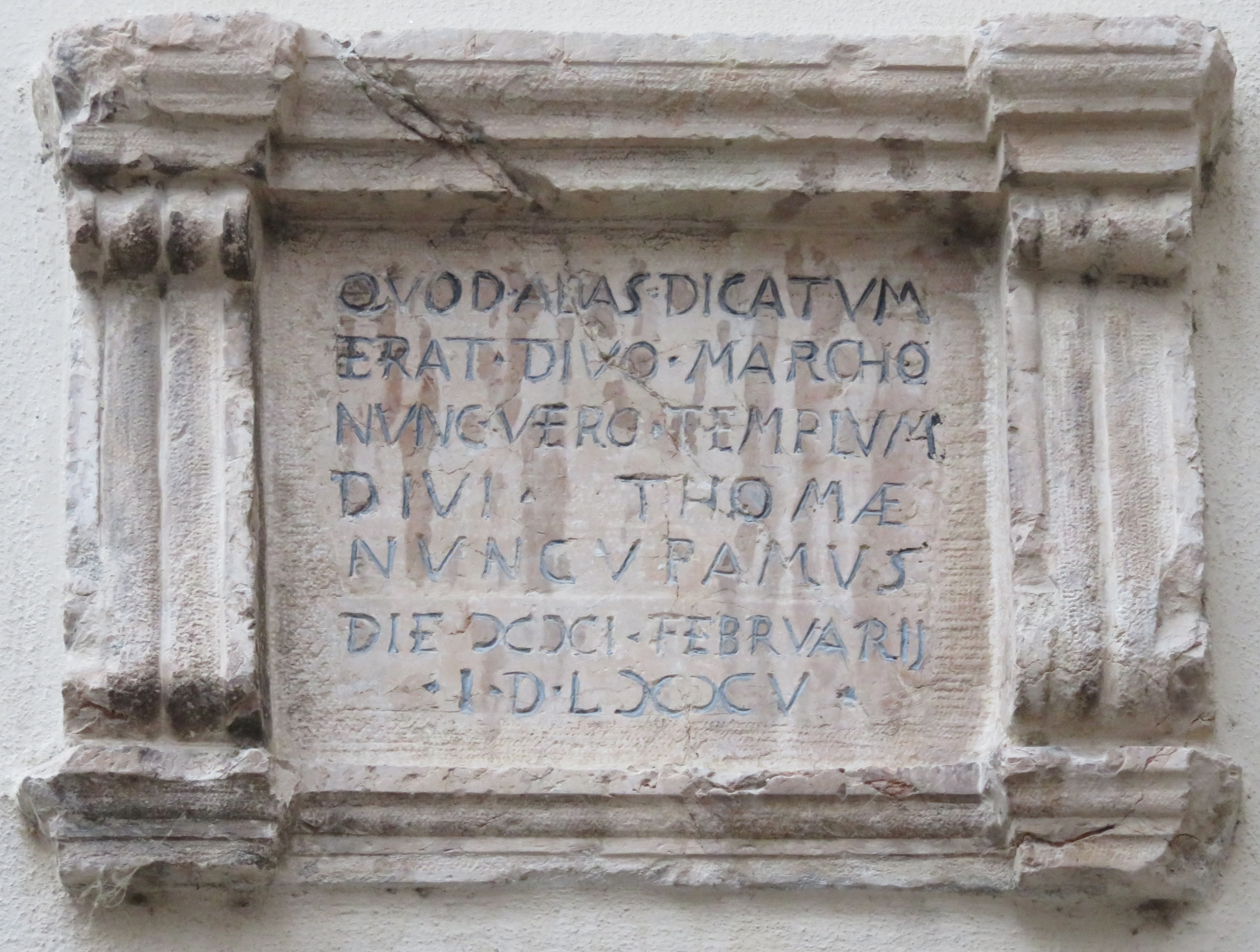 Lapide posta sulla parete esterna che ricorda un cambio di dedica della chiesa che non è mai avvenuto. Si sarebbe dovuti passare da San Marco a San Tomaso. Oggi è ancora San Marco